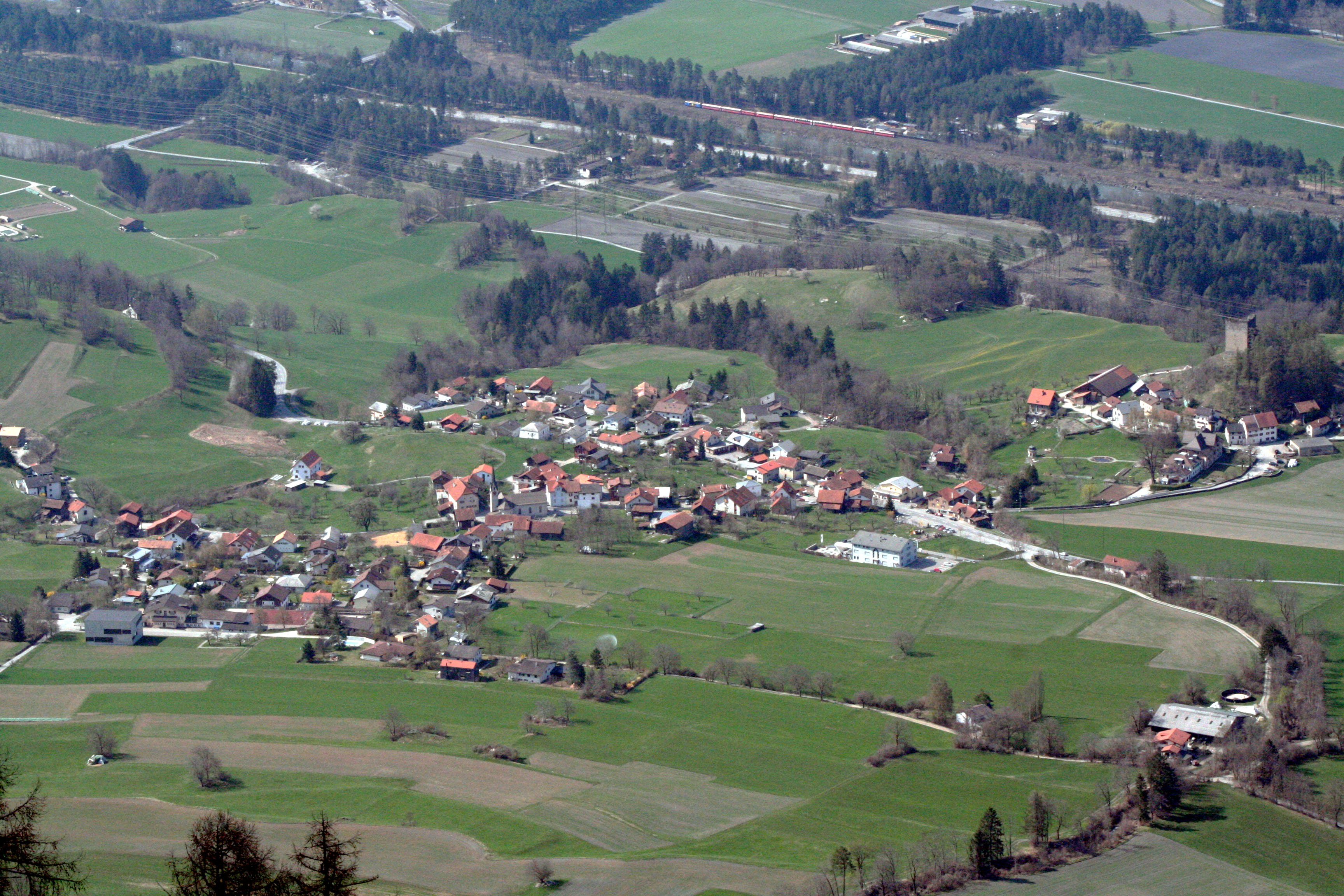 Paspels